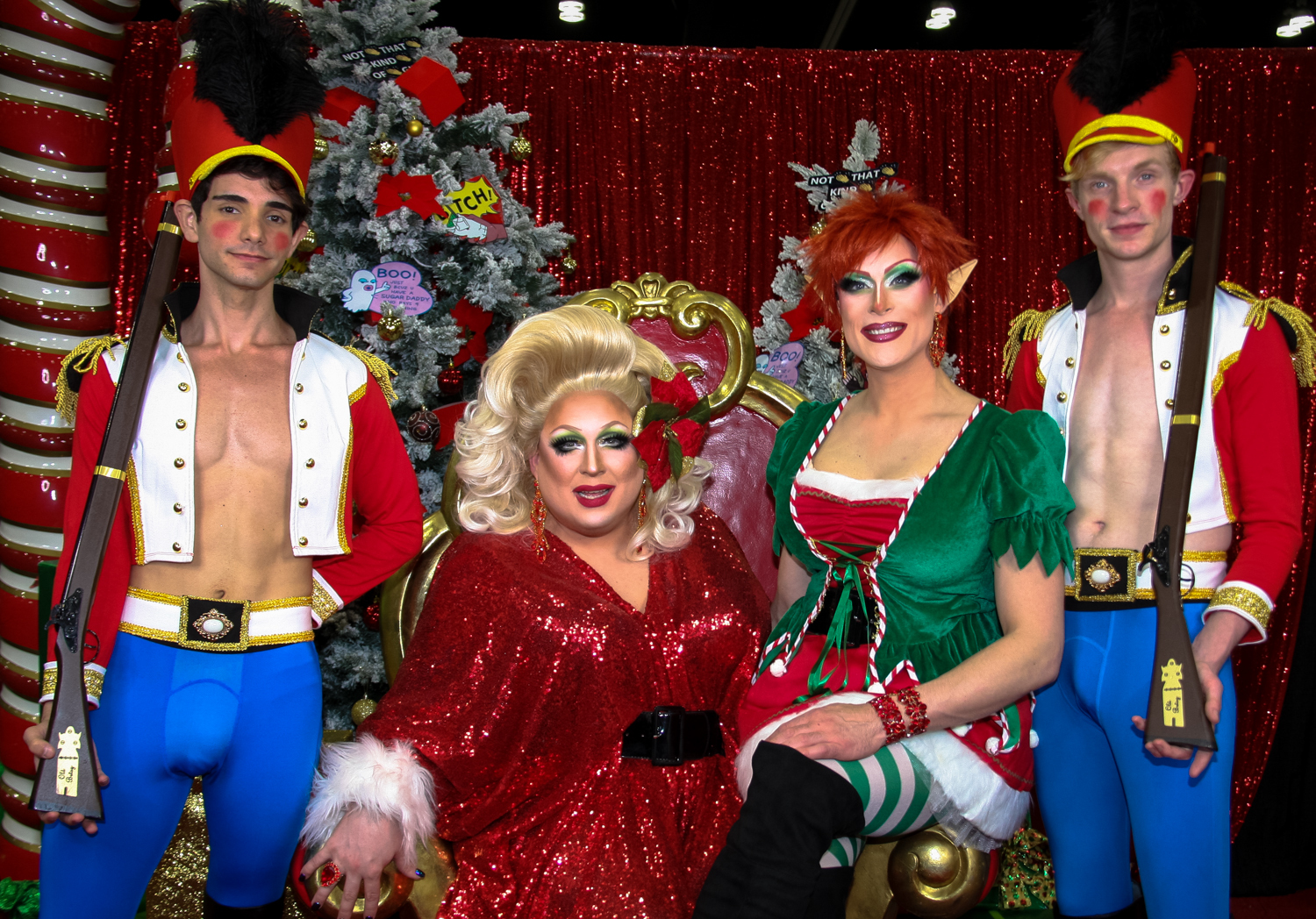 Rupaul DragCon 2019 - Los Angeles